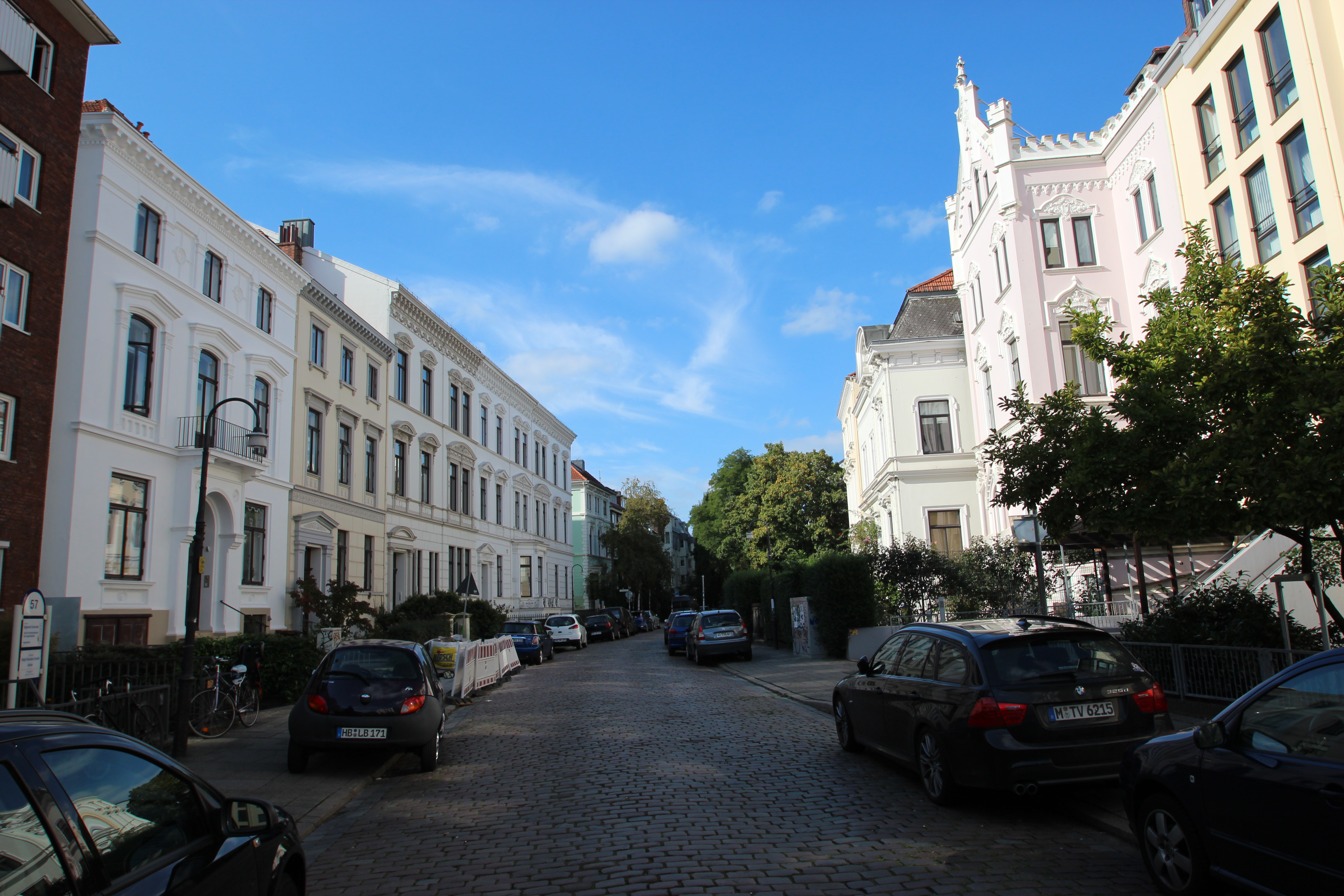 Ensemble Kohlhökerstraße in BremenDie Denkmalgruppe ist ein geschütztes Kulturdenkmal in der Freien Hansestadt Bremen, mit der Nr. 1422 beim Landesamt für Denkmalpflege registriert.